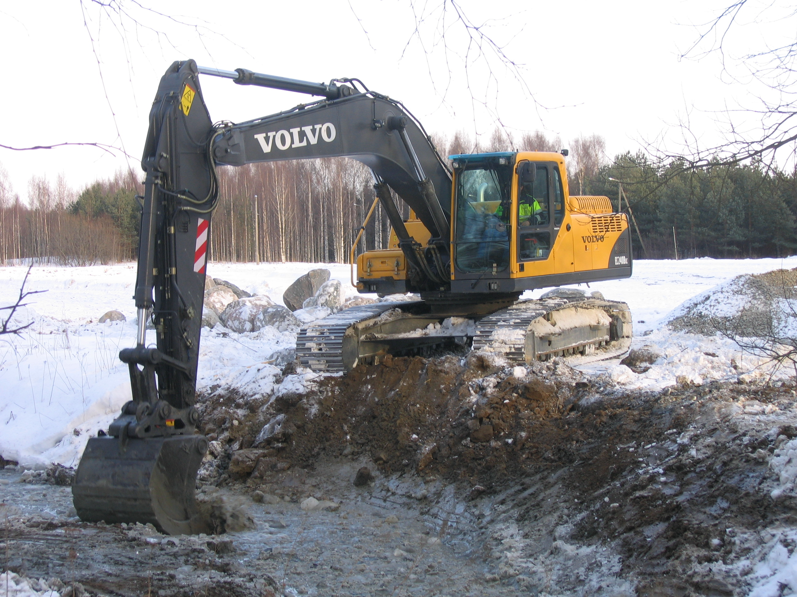 Longinojan kunnostus